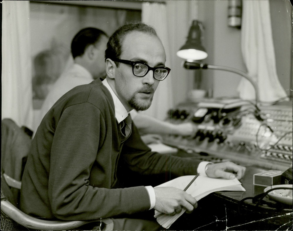 Lasse O'Månsson (1931–1988).